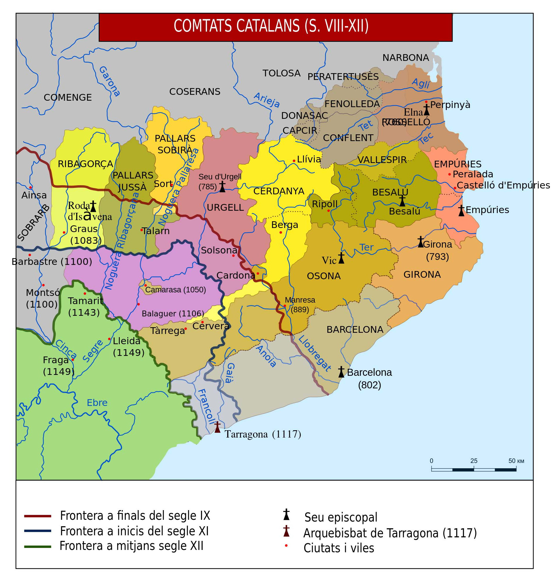 Comtats catalans s. VIII-XII.svg (modificat)